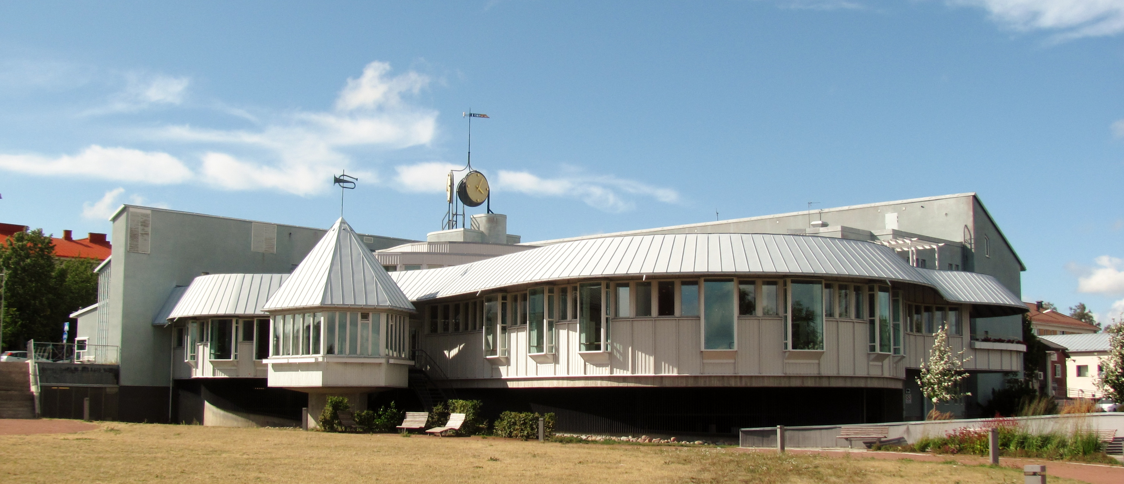 Stadtbücherei, Mariehamn, Fasta Aland, Finnland